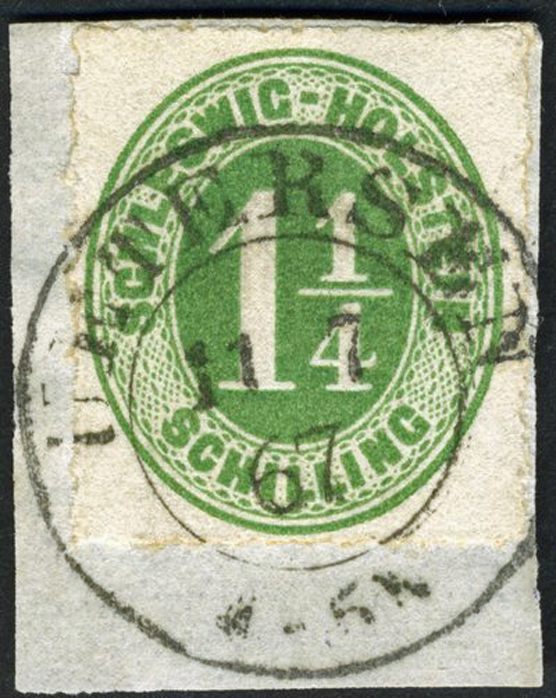 Poststempel des ehemaligen Postamtes in Uetersen aus dem Jahr 1867